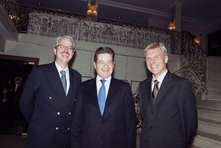 Freiburg im Breisgau: Dr. Albrecht Schmidt, Vorstandsvorsitzender der Hypo-Vereinsbank, hält einen Vortrag vor dem Freundeskreis der Wirtschaftsjunioren